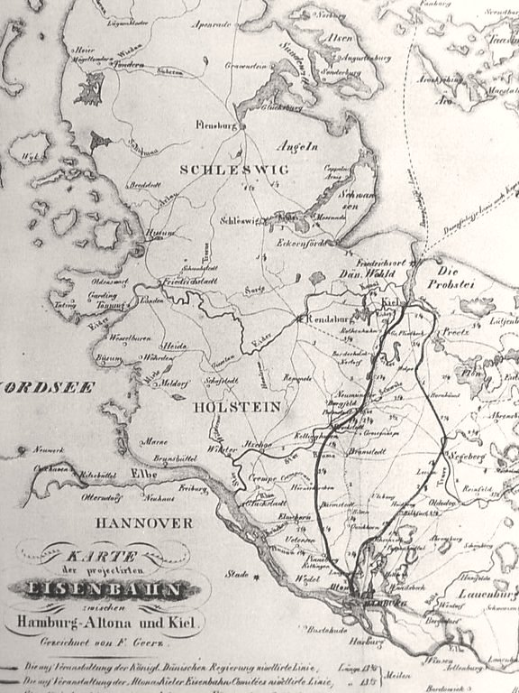 Darstellung der ursprüngl. Trassenvarianten der Christian VIII Ostseebahn (Altona-Kiel); tatsächlich verwirklicht wurde größtenteils die Westvariante, die allerdings im Südteil noch über Elmshorn (also noch etwas weiter westlich) geführt wurde.